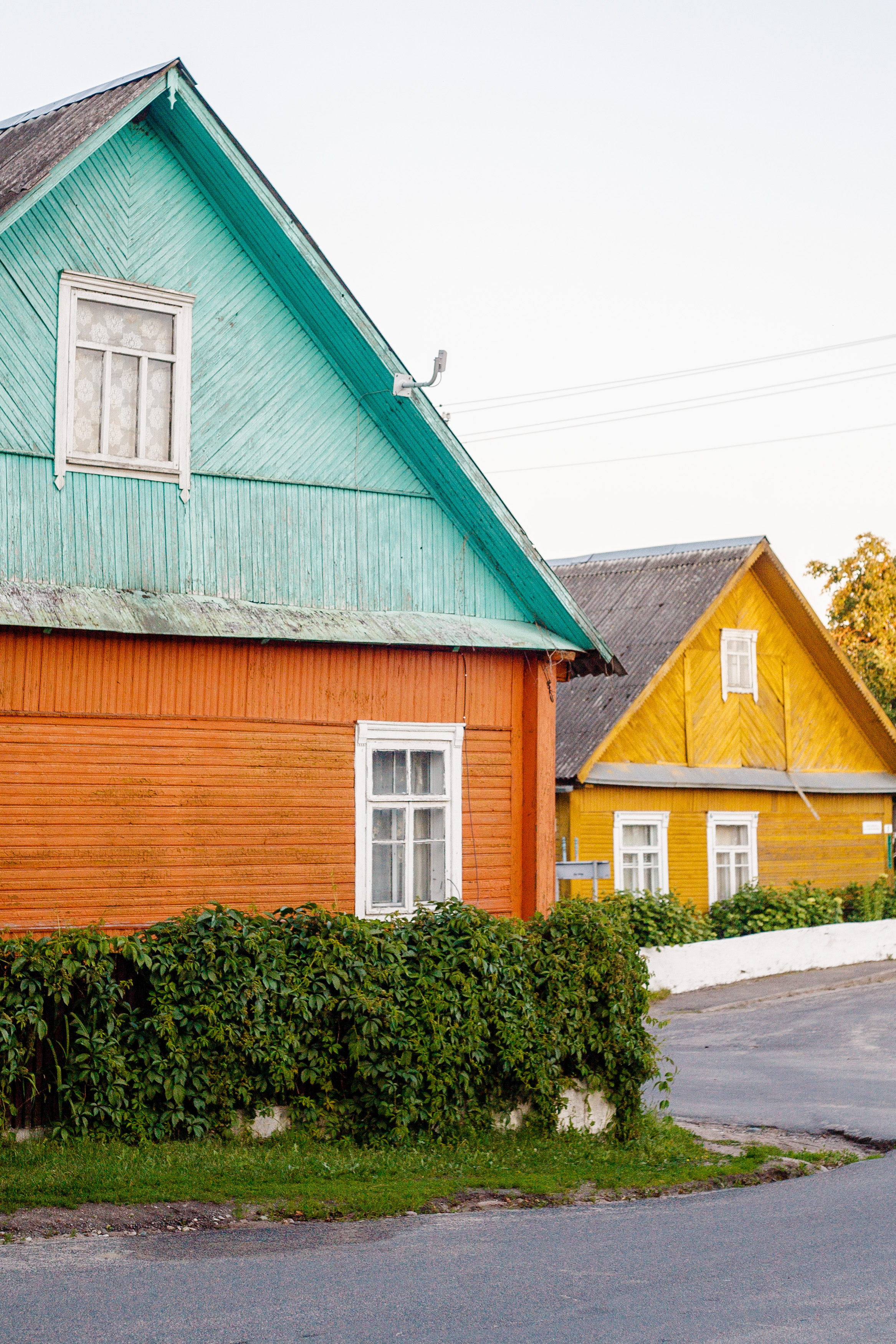 Pastatai Dieveniškių aikštėje